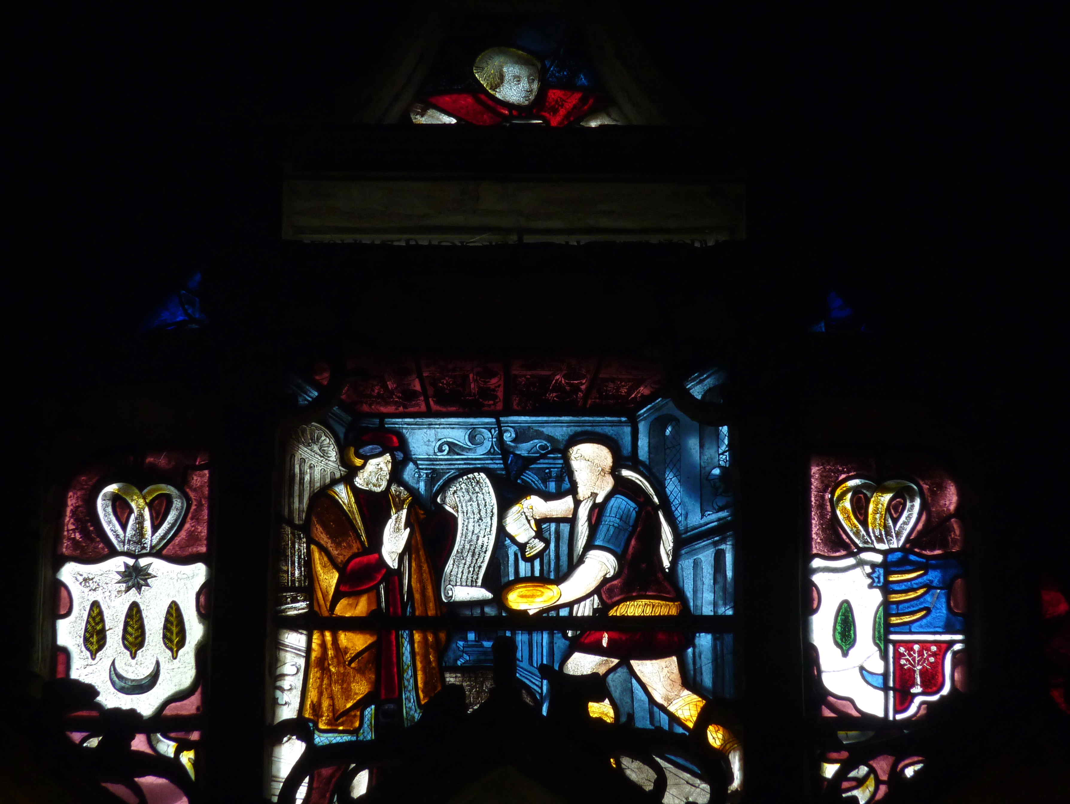 Katholische Pfarrkirche Notre-Dame-des-Marais in La Ferté-Bernard im Département Sarthe (Pays de la Loire/Frankreich), Bleiglasfenster (baie 22), um 1540, von Léopold Charles 1851 restauriert; Darstellung: Verspottung Jesu, im Maßwerk: Pilatus wäscht seine Hände in Unschuld (Ausschnitt)